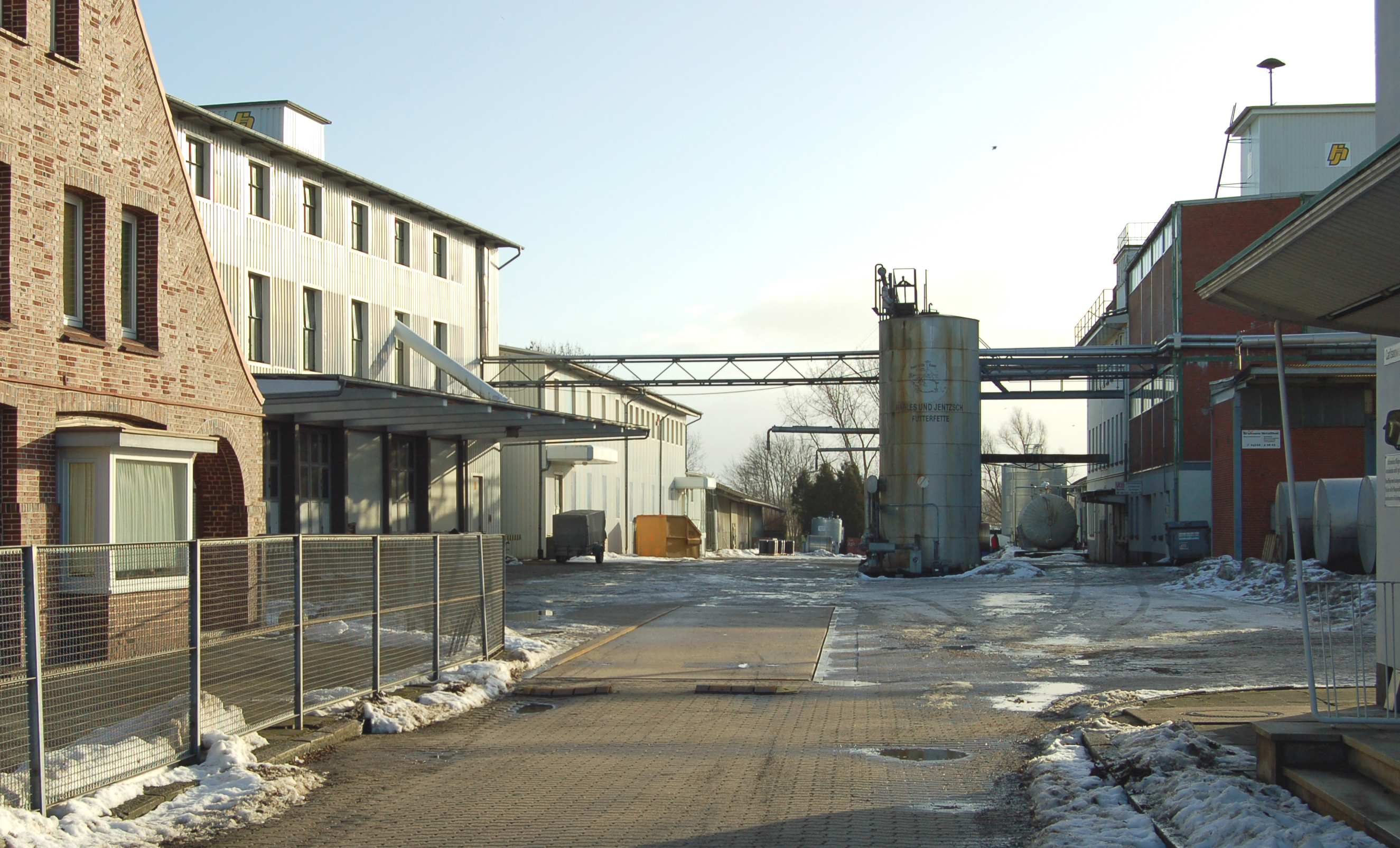 Die Firma Harles und Jentzsch in Uetersen, ein Spezialbetrieb für die Verarbeitung von tierischen und pflanzlichen Fetten und Ölen. Diese Firma sorgte im Dezember 2010 / Januar 2011 für einen der größten Dioxinskandale in Deutschland, zig Tausende von Hünern und Hunderttausende (täglich 400.000) Eier wurden durch Dioxinverseuchtes Futterfett mit Dioxin belastet. Zwei von sechs Eierproben waren mehr als doppelt so stark mit Dioxin belastet gewesen als es der zulässige Grenzwert der Europäischen Union erlaubt.